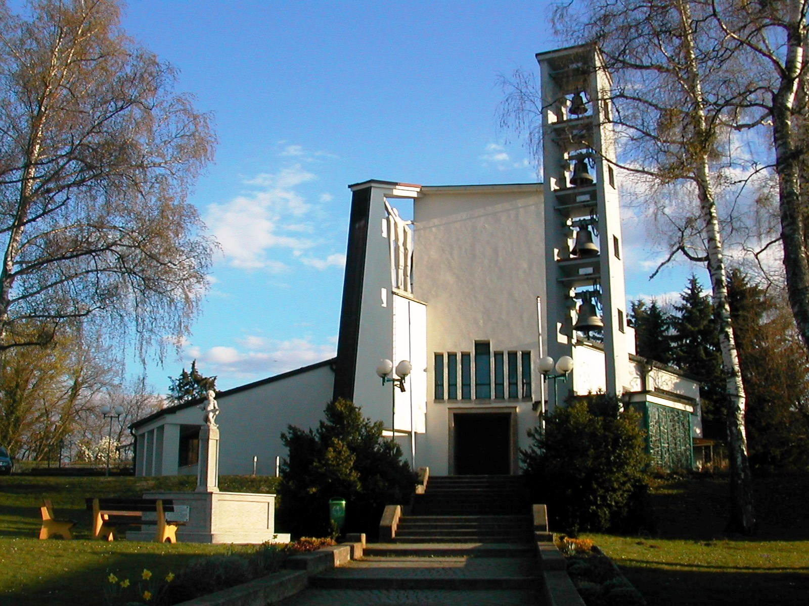 Kirche von/church of Laßnitzhöhe, AT